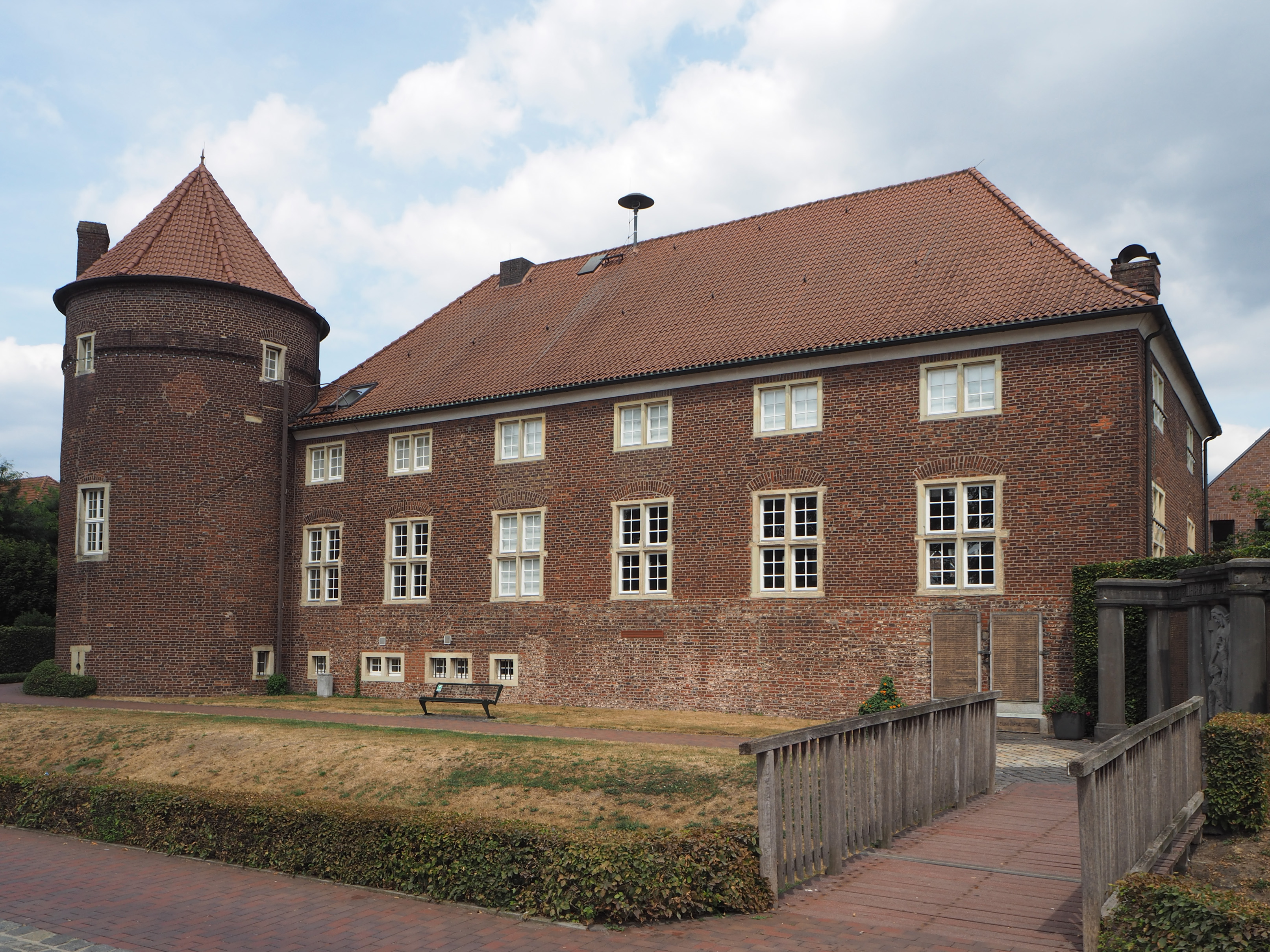 Velen-Ramsdorf - Burg Ramsdorf - Burgplatz 4 Das Backsteingebäude entstand 1727. Es beherbergt heute ein Museum zur Regionalgeschichte.